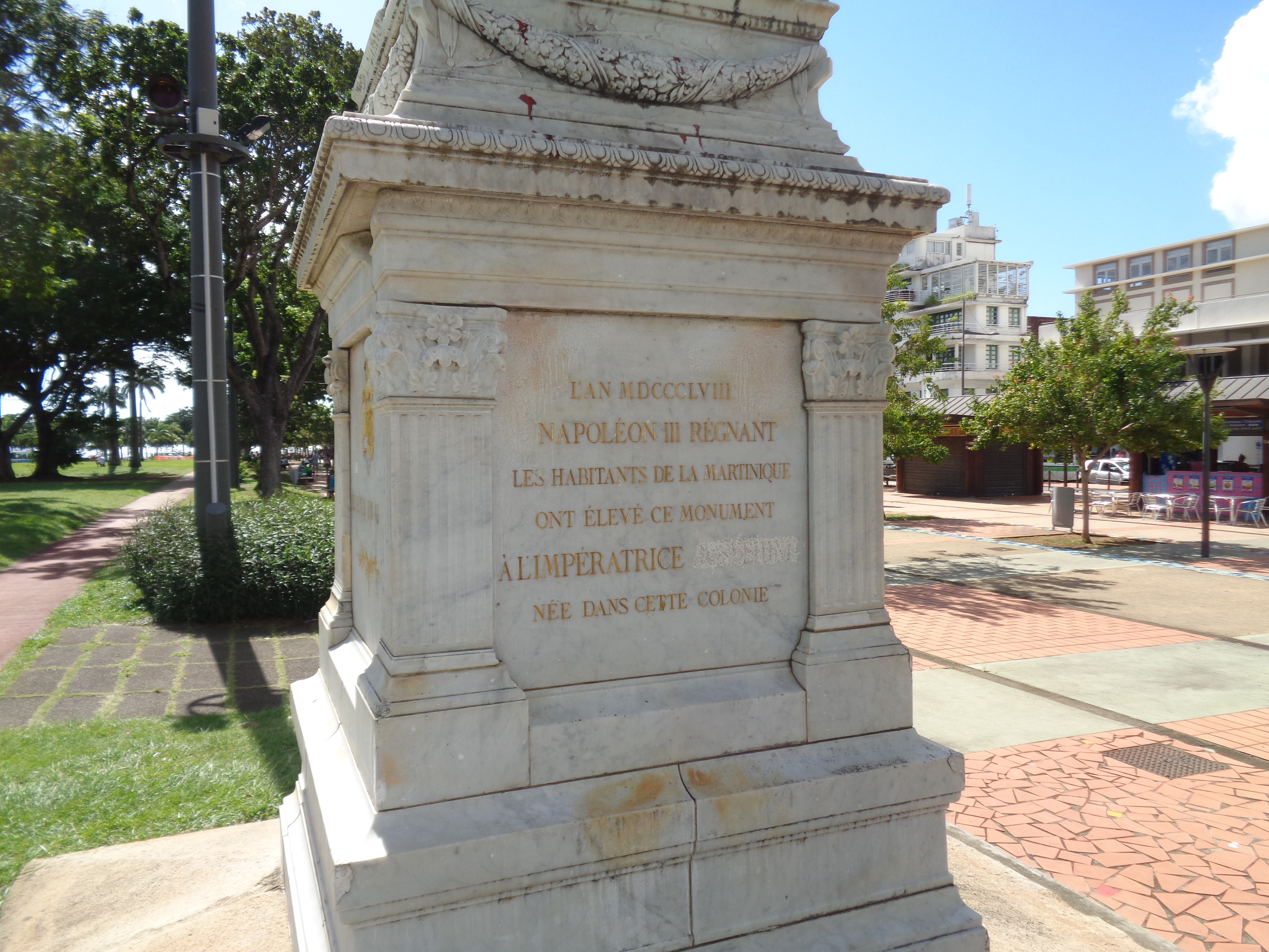 Socle de la statue de la statue de l'impératrice Joséphine, place de la Savane à Fort-de-France (Martinique) avec son nom effacé.